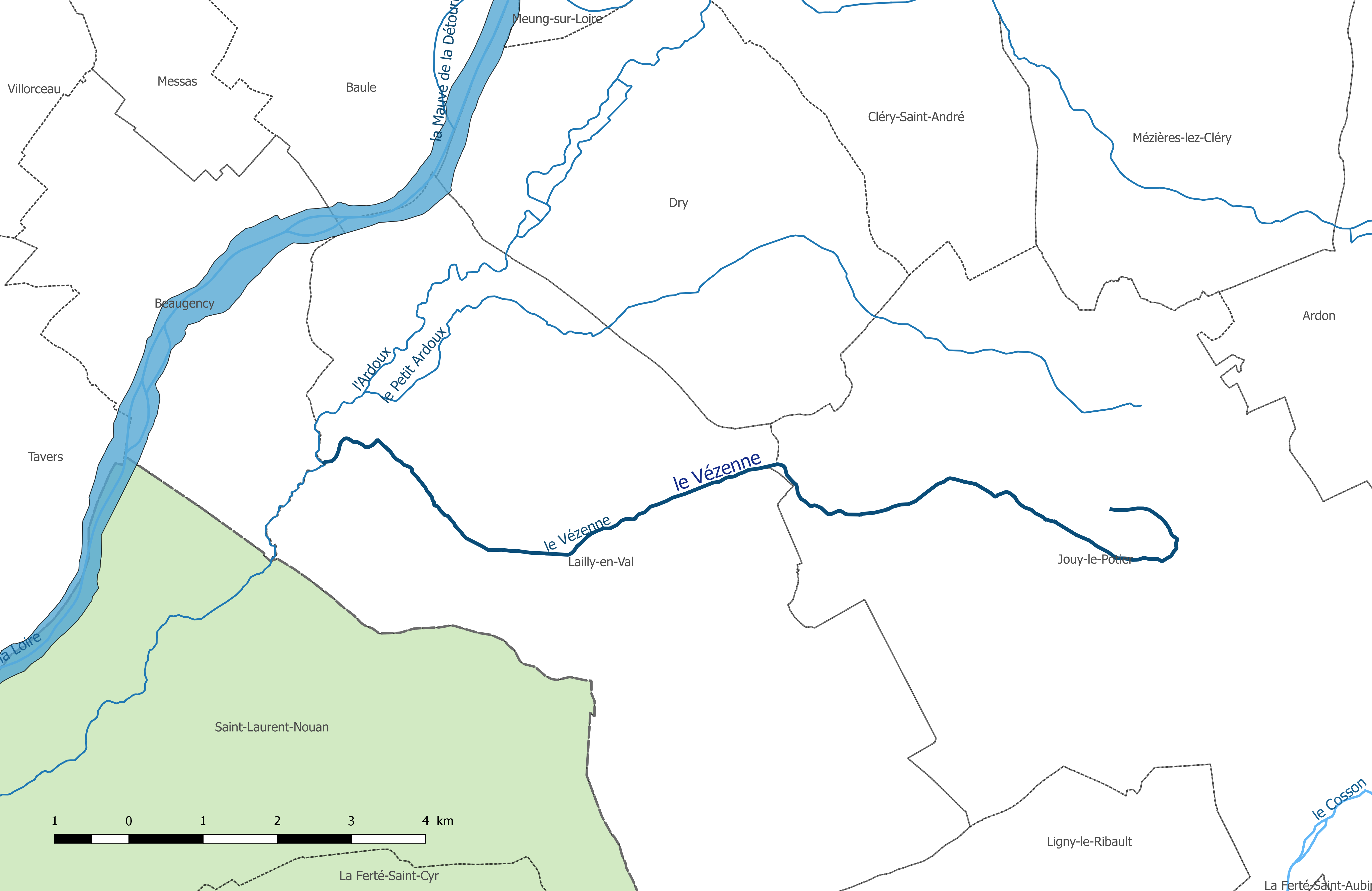 Carte du cours d'eau "la Vézenne", dans le département du Loiret.